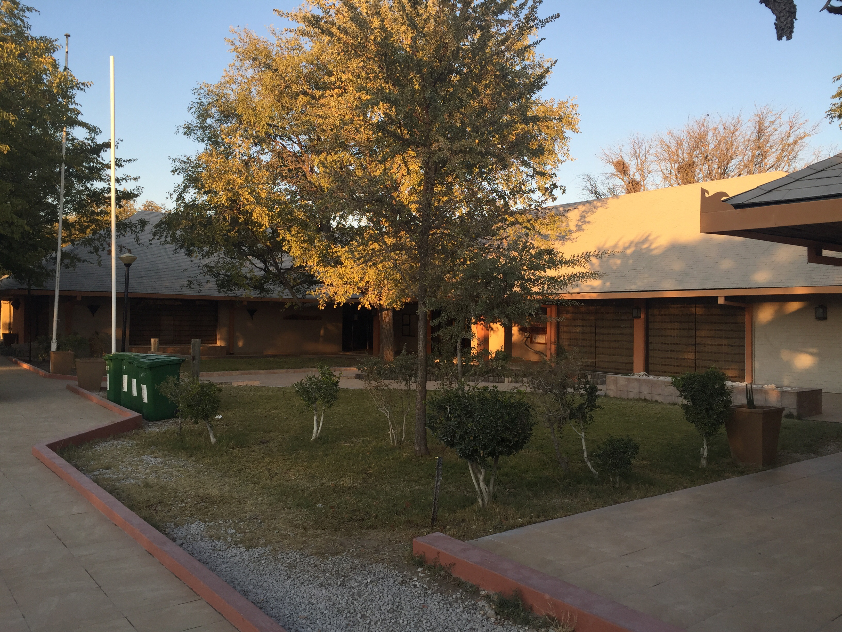 Halali Camp in Etoscha Nationalpark.